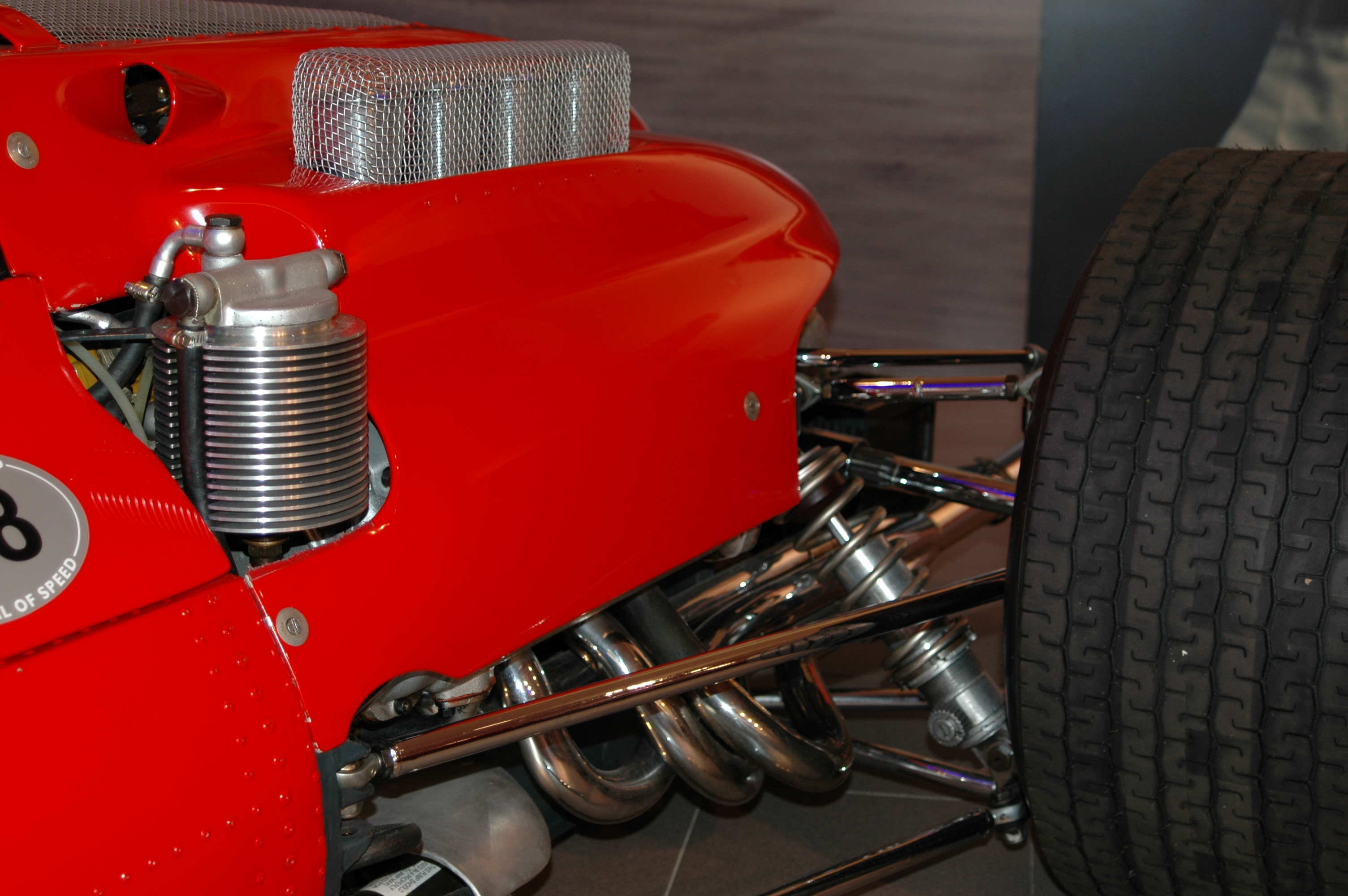 Ferrari 158 F1 rear suspension detail